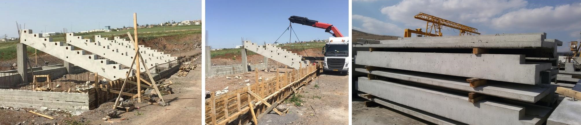 Bodek Architects Tiberias Football Stadium